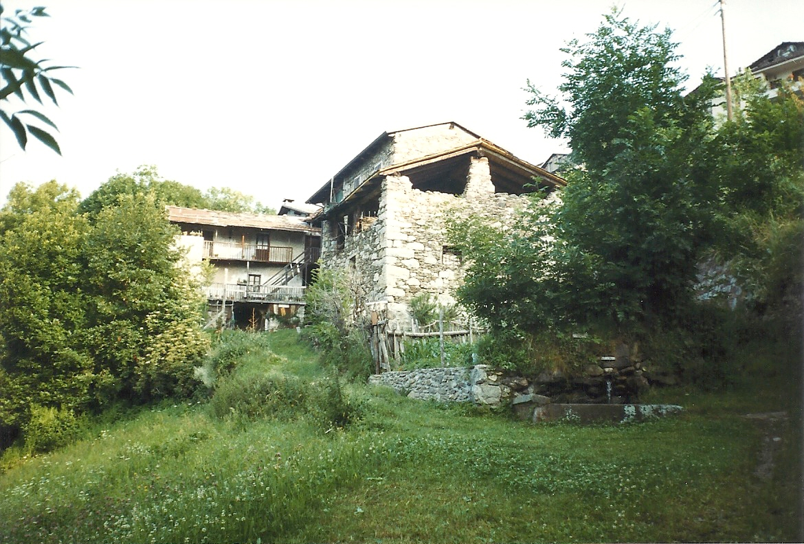 Anni novanta